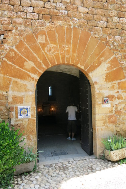 castell de Piera, Comarca Anoia - Catalunya